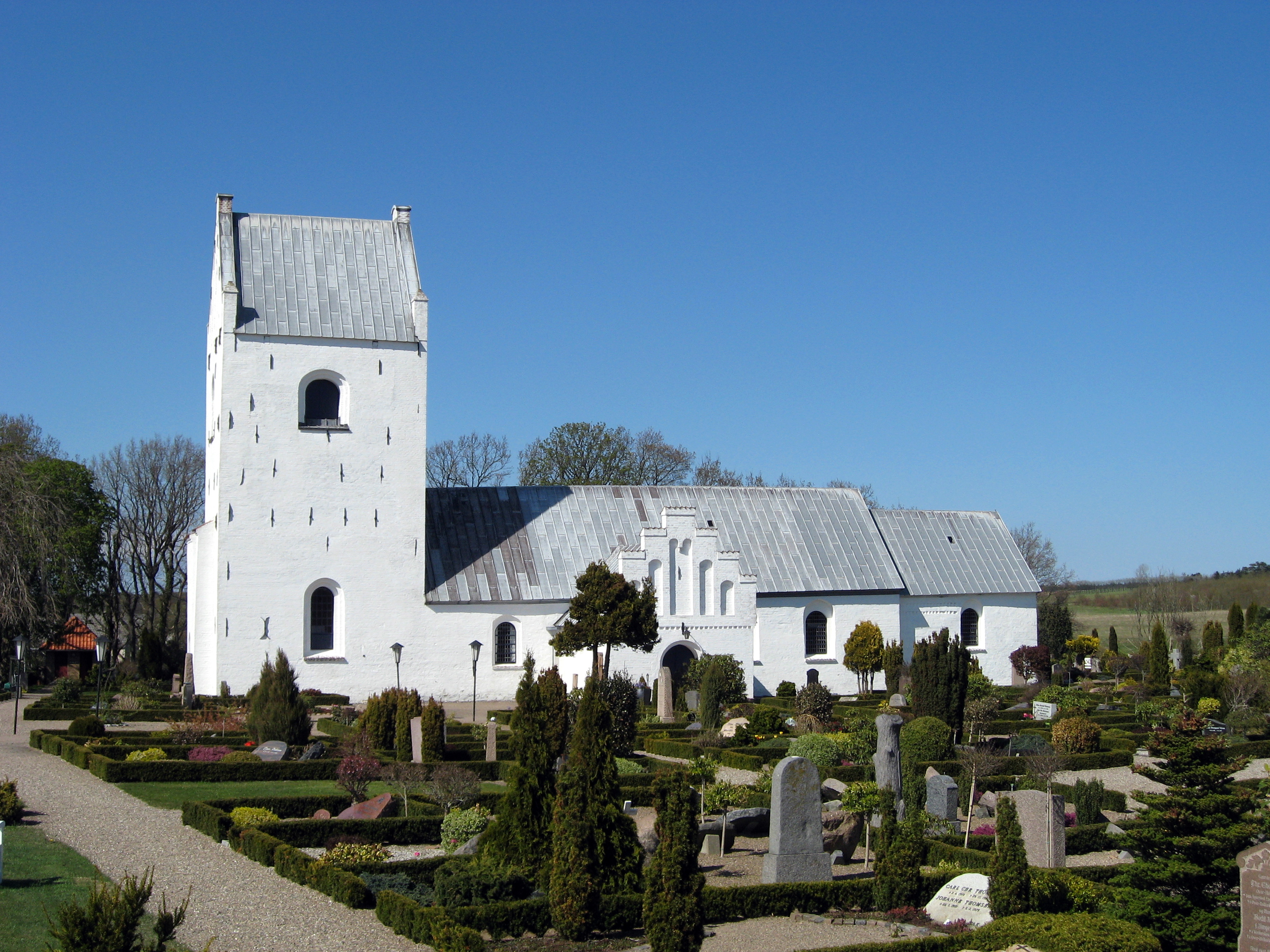 Albæk Kirke, Frederikshavn Kommune